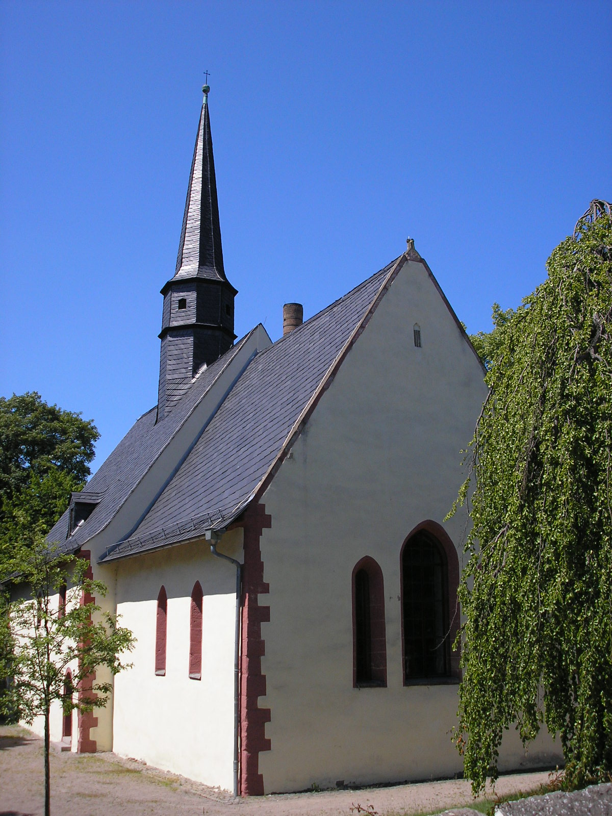 Die Marienkirche in Pößneck (Thüringen).